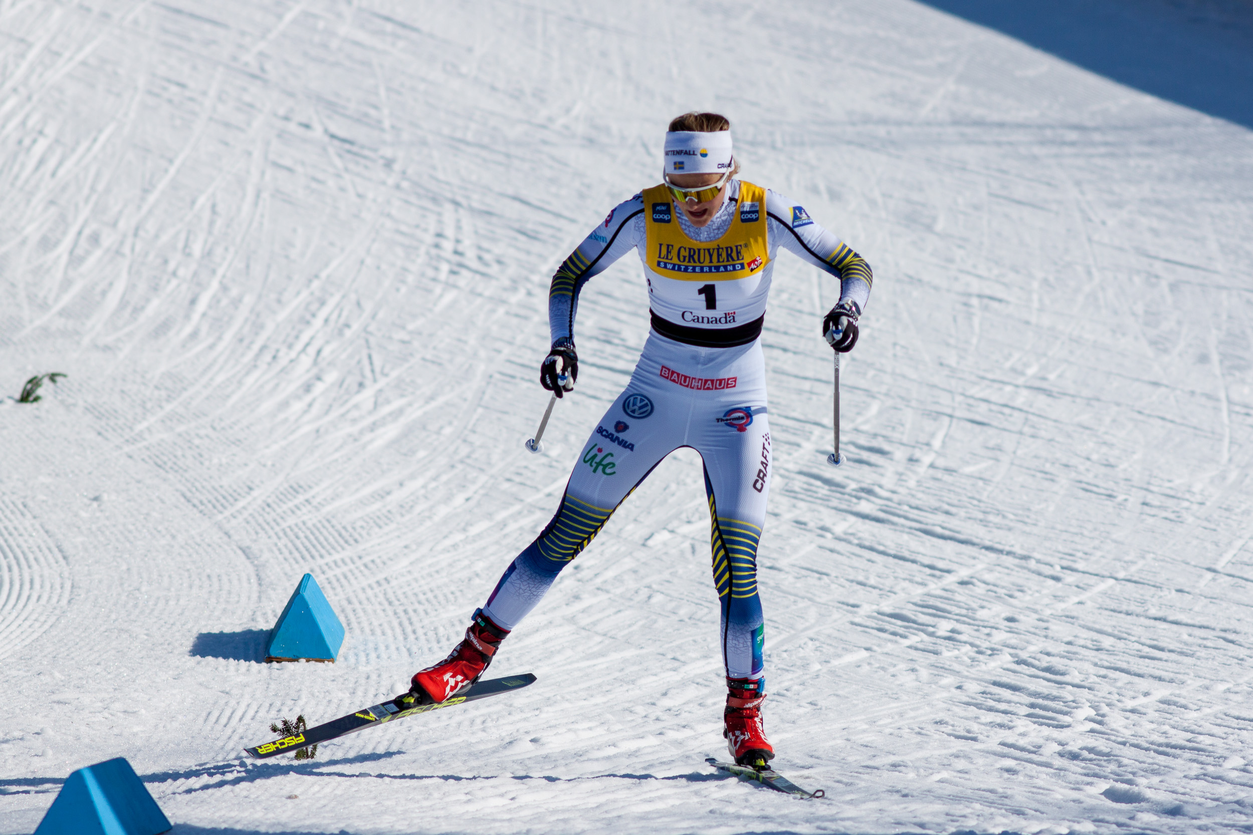 Stina Nilsson